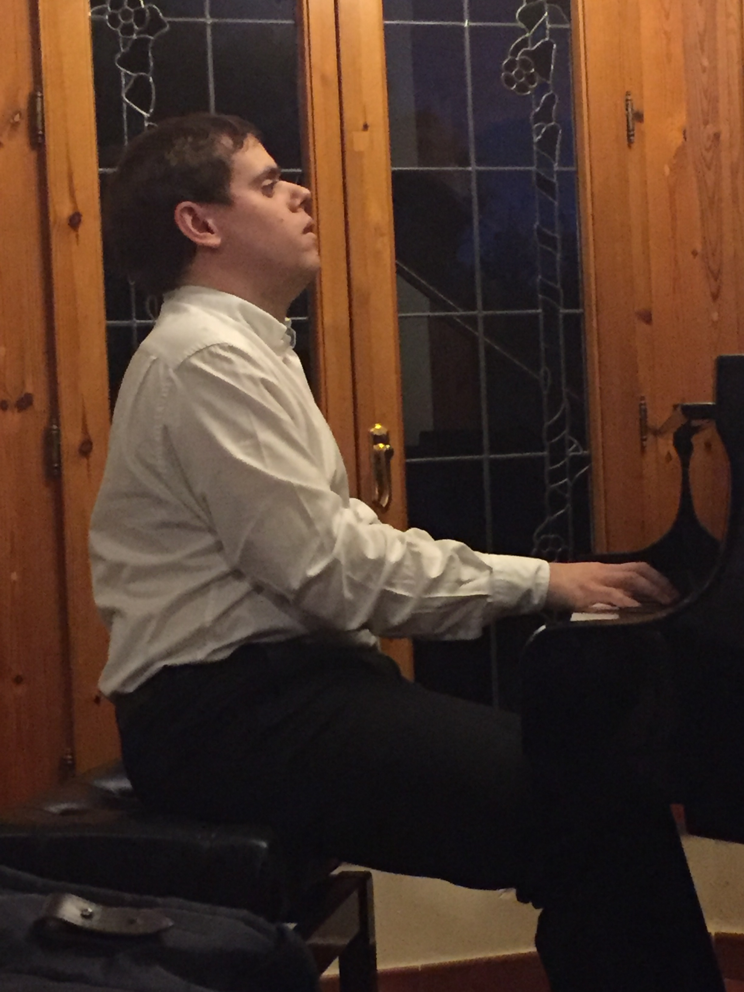 Ignasi Cambra en un recital a l'Ametlla del Vallès.